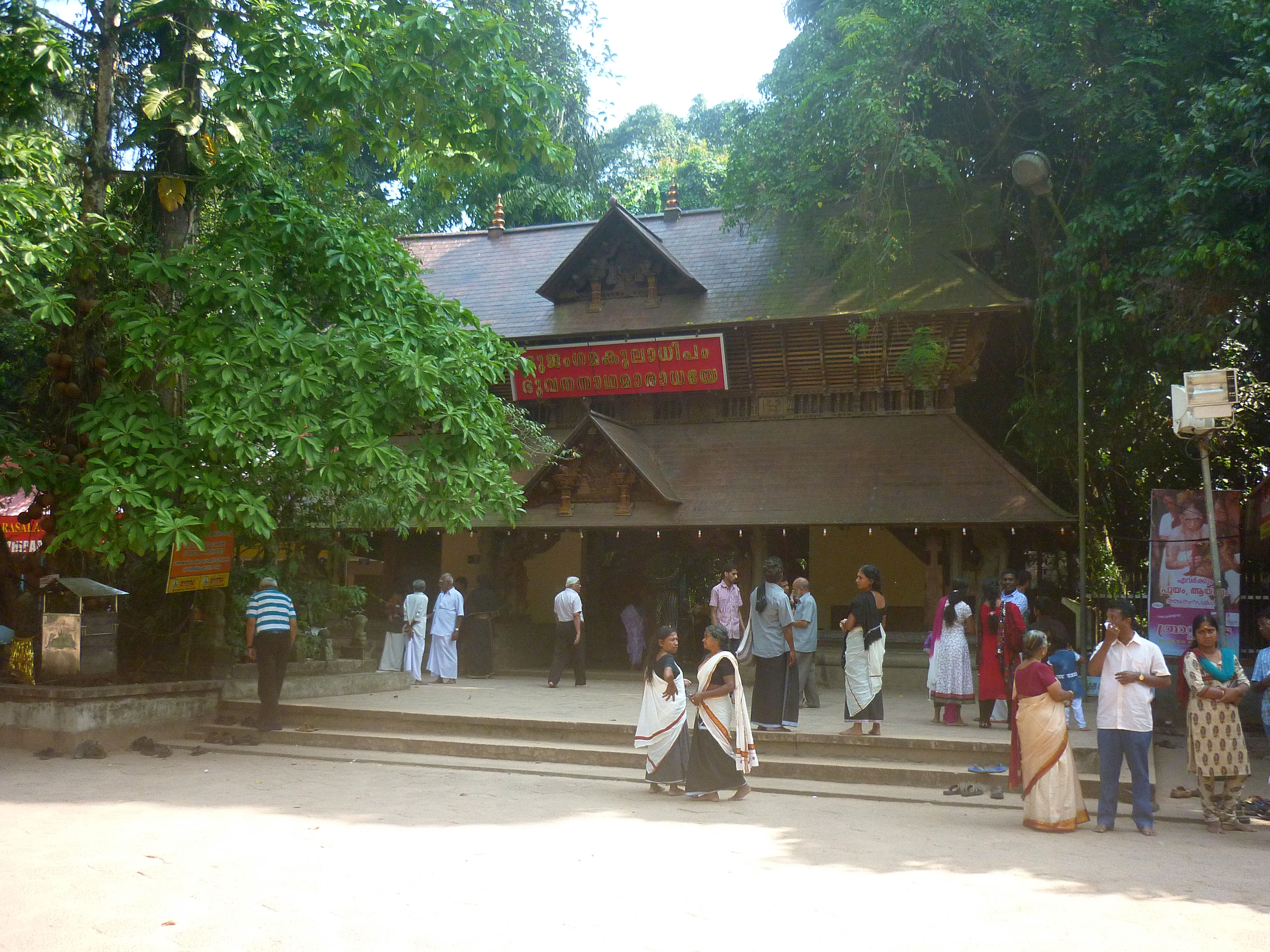 മണ്ണാറശ്ശാല ക്ഷേത്രം